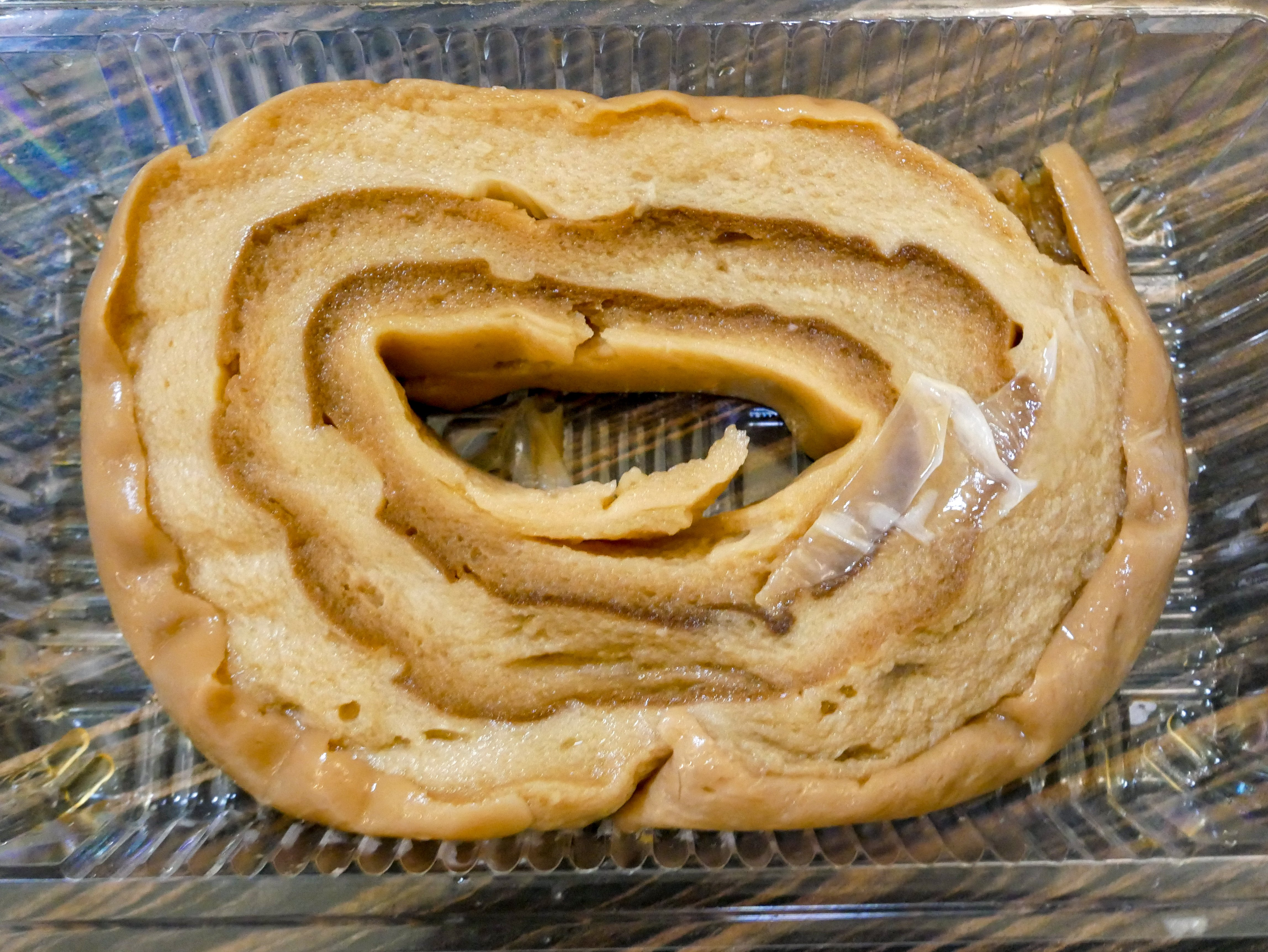 新潟県長岡市、車麩の煮付け、惣菜